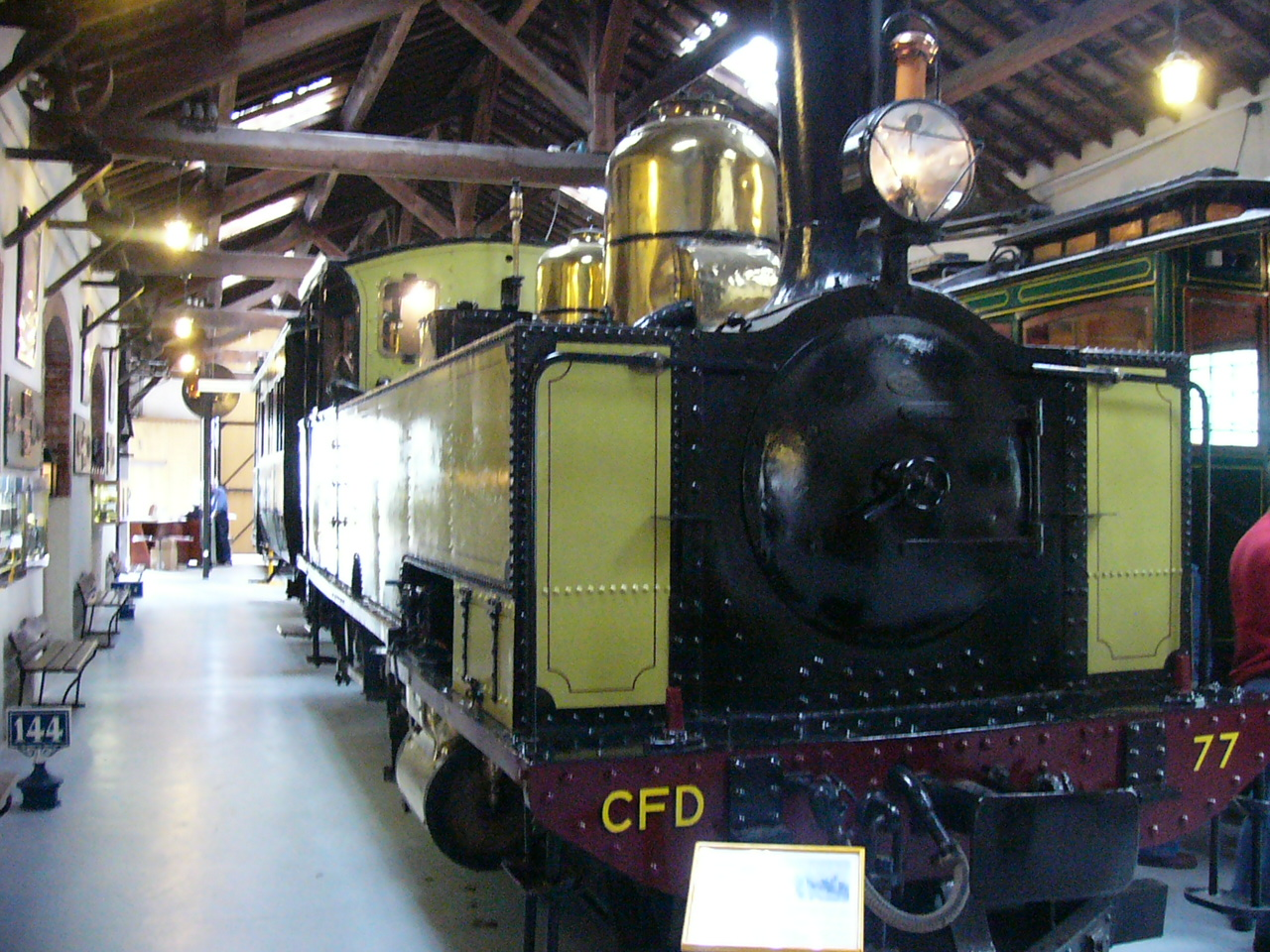 Locomotive 130T Cail (voie métrique) au musée des transports de Pithiviers